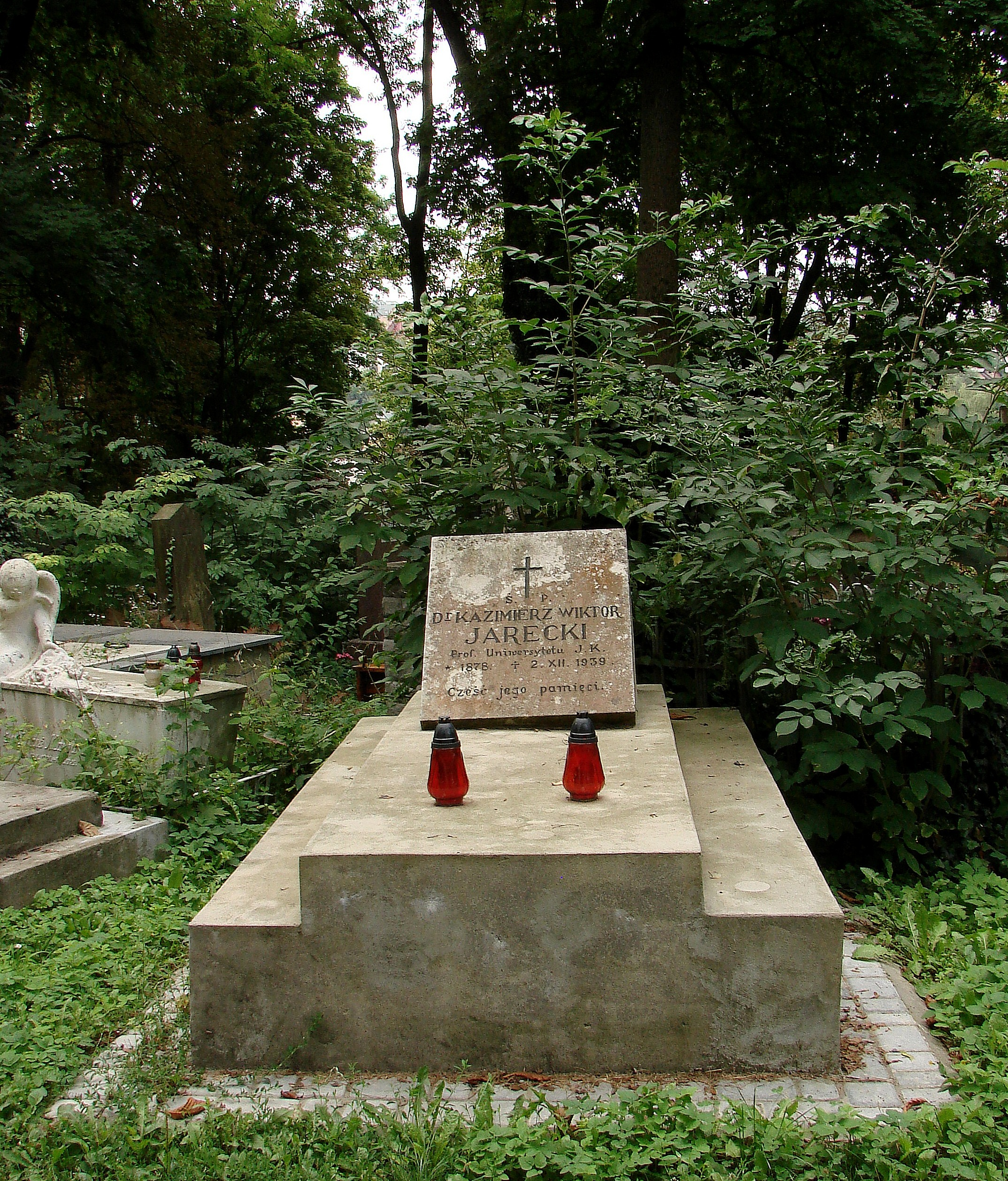 Пам'ятник на могилі К. Ярецького. Личаківський цвинтар , поле № 74.